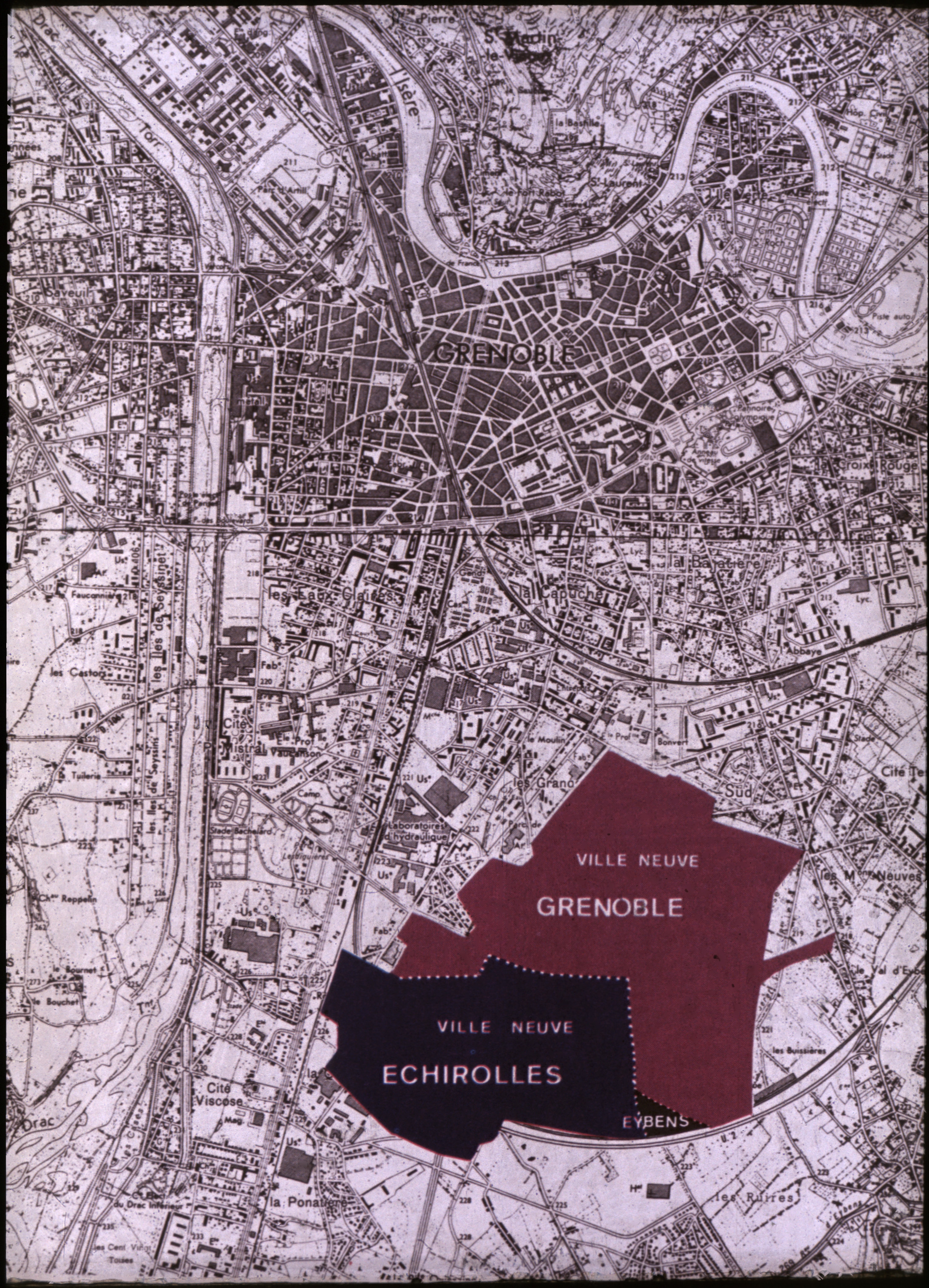 Emprise foncière de la Villeneuve de Grenoble et d'Echirolles